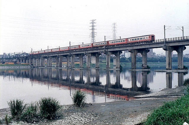 台鐵第三代新店溪橋(1992) was filmed by TDCKW on 19990522